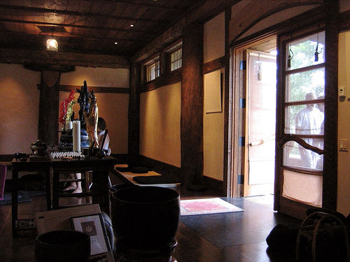 Intérieur du Zendo d'Upaya Zen Center, Santa Fe, New Mexico, les États-Unis